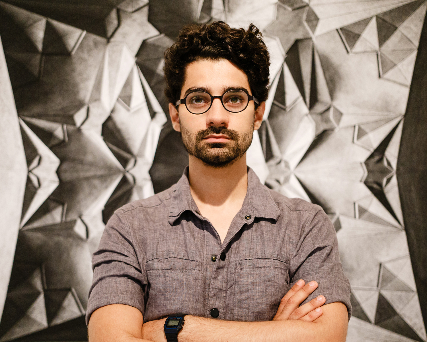 Retrato do artista Felippe Moraes em 2018 em frente à fotografia da série "Keyhan" (2017). Foto por Jean Ribeiro